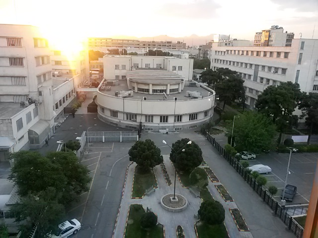 ساختمان نخست بانک مرکزی ایران، خیابان فردوسی، تهران